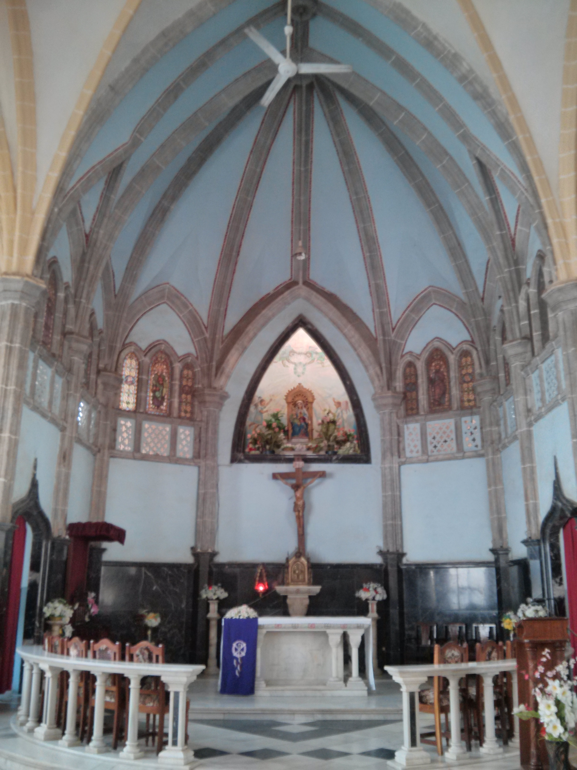 Kathedrale von Malabo, Innenraum